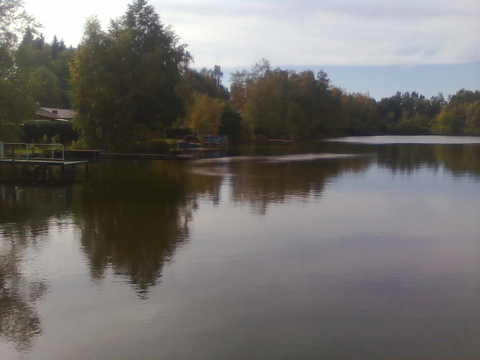 Blick über den Teich, vom Damm aus